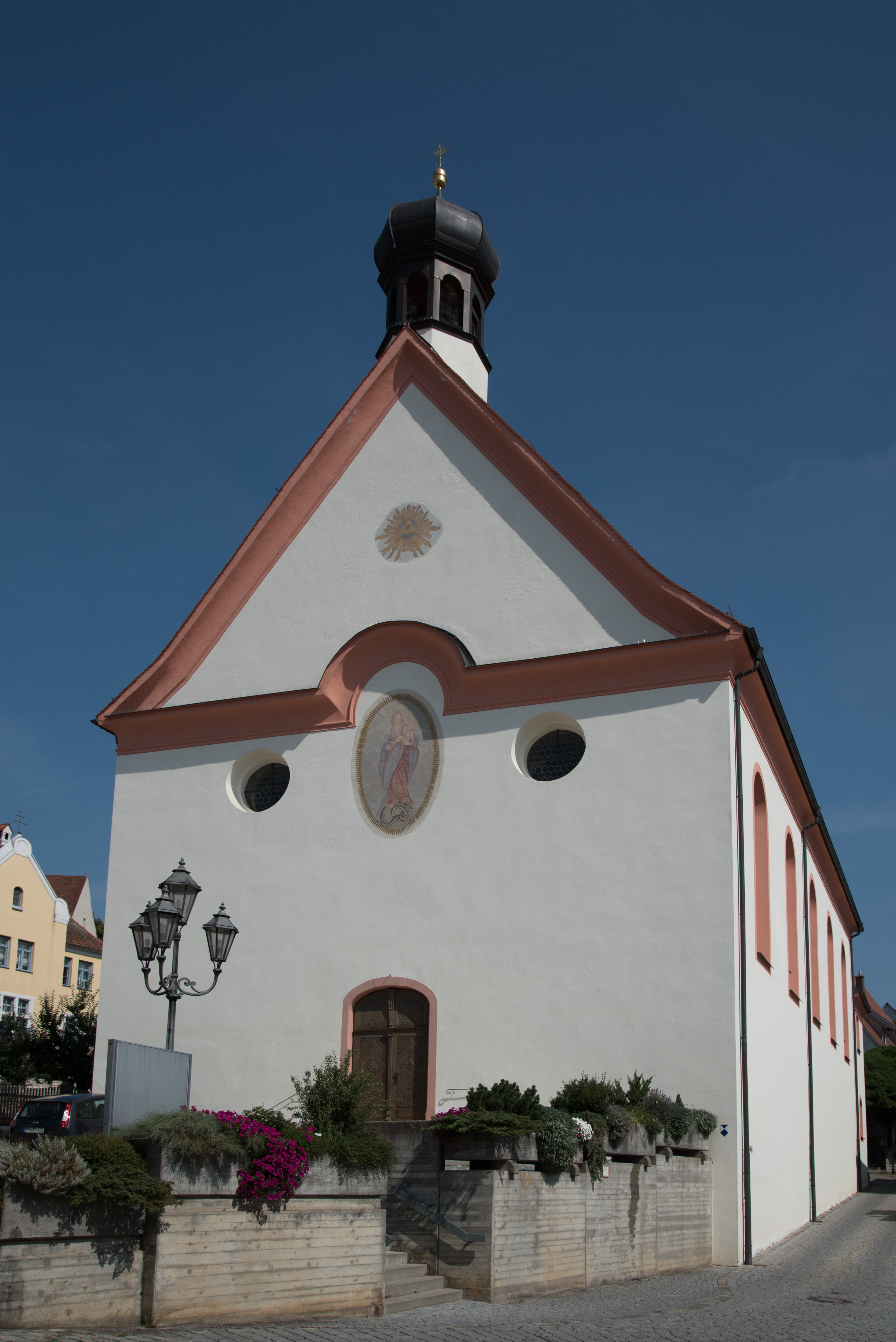 Greding, Am Kirchberg 3